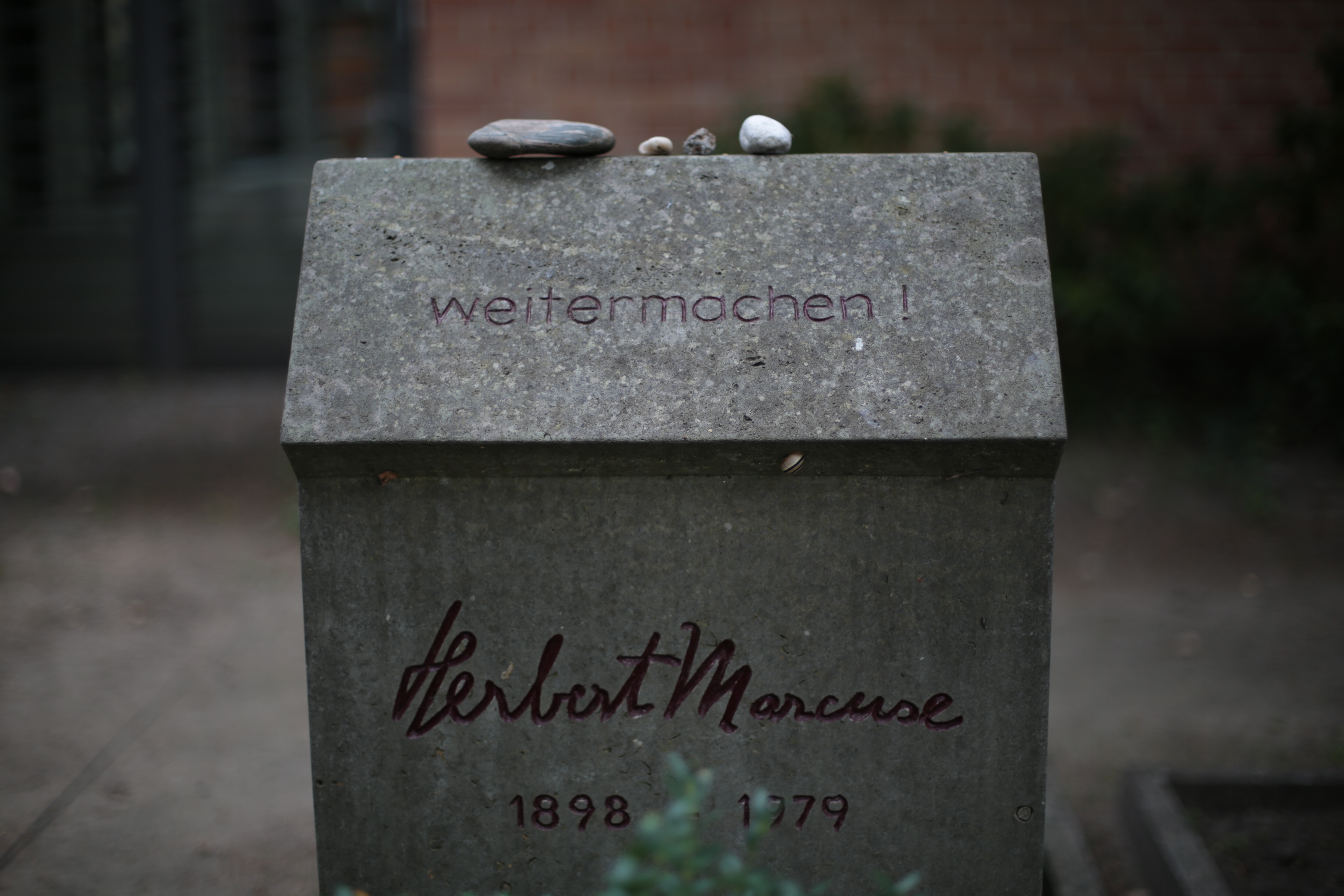 La tomba di Marcuse al Dorotheenstädtischer Friedhof di Berlino